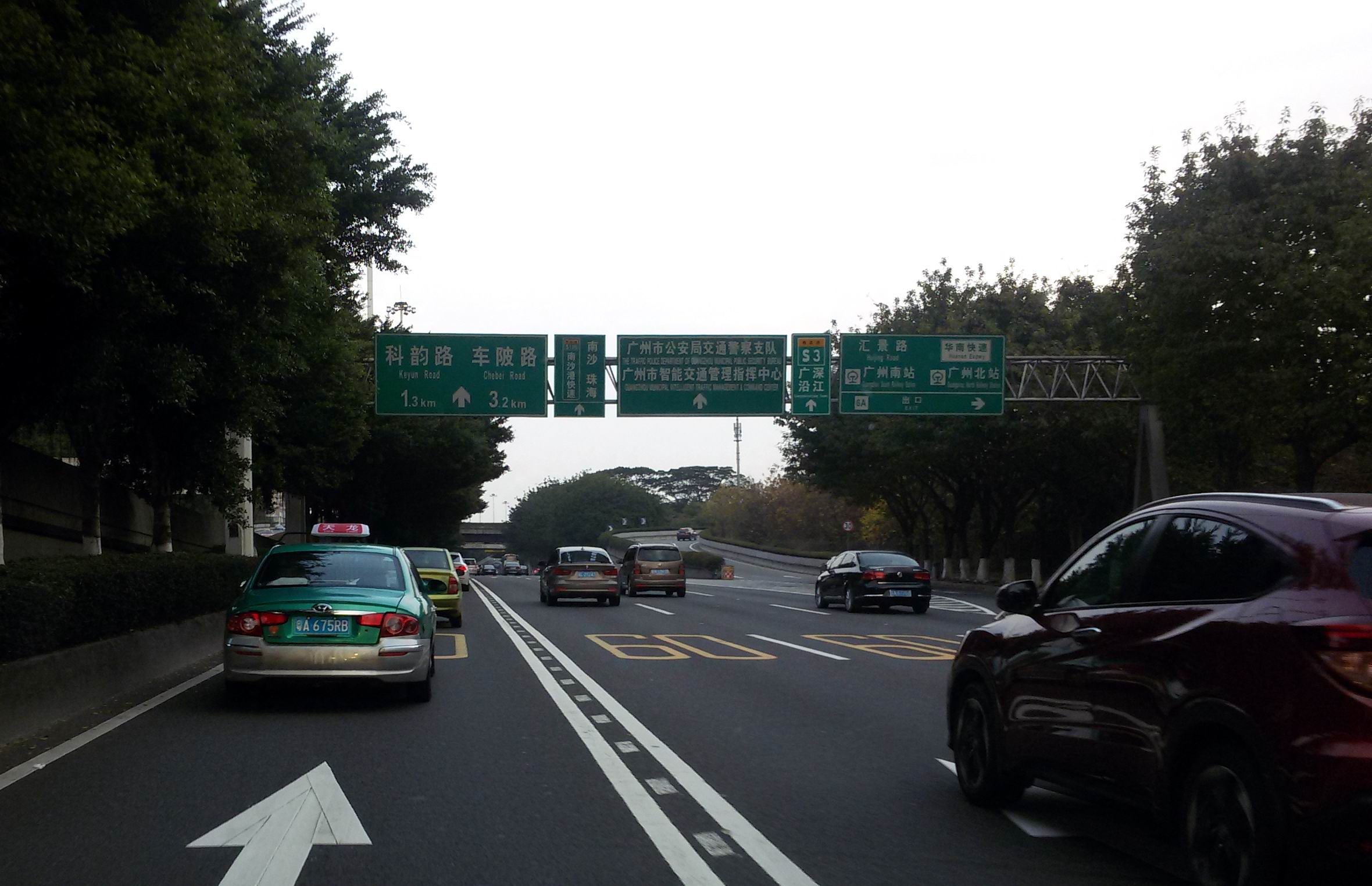 广州 广园快速路 6A出口 东向